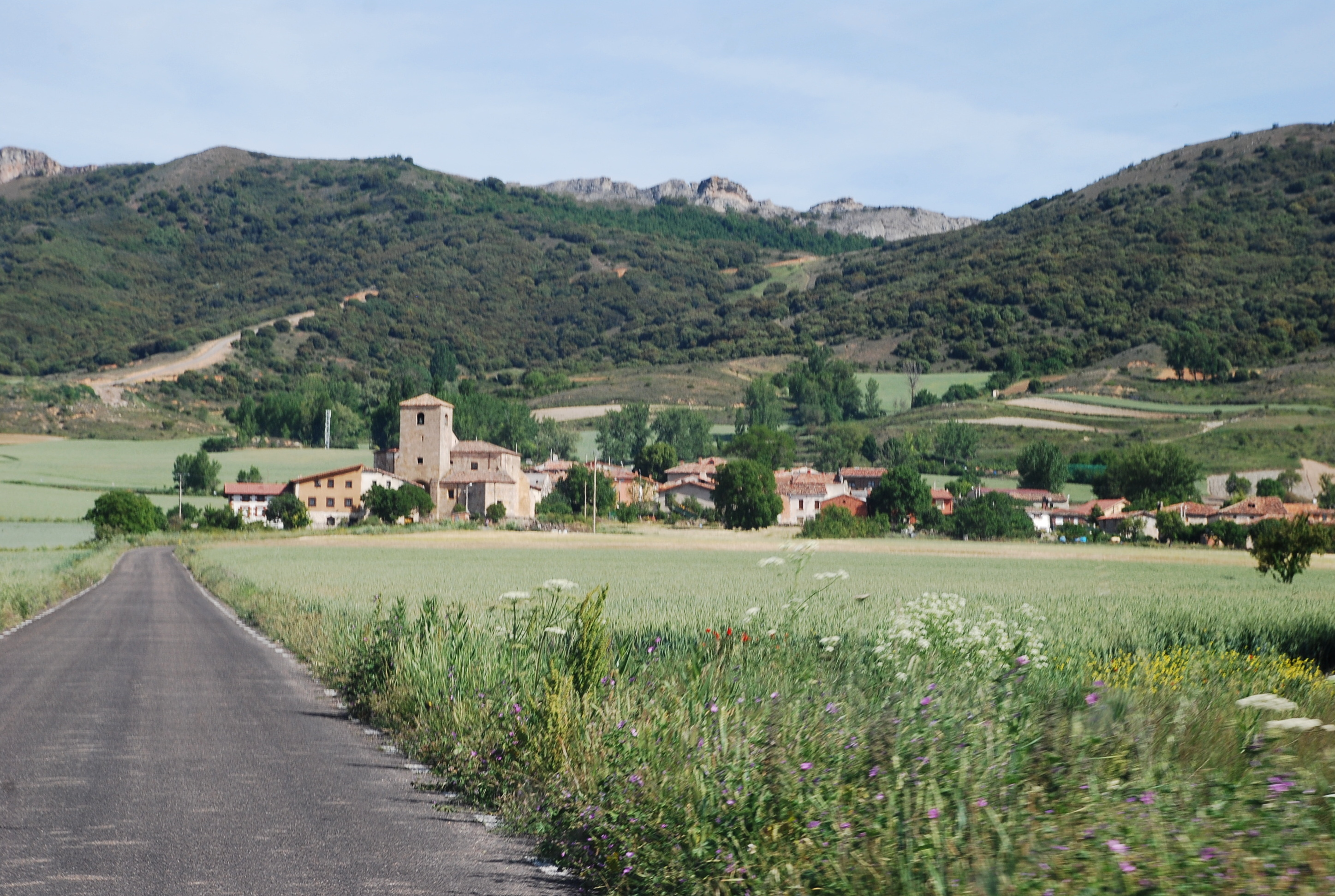 Cascajares de Bureba